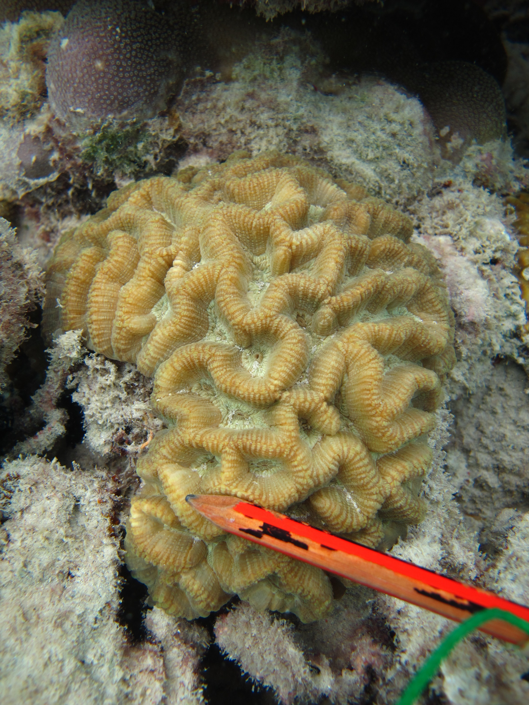 Paragoniastrea australensis (sinonimia: Goniastrea australensis), isla Aureed, Estrecho de Torres, Australia